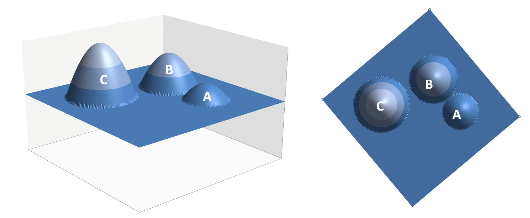 Wir betrachten das Beispiel aus Three Peaks forming an Island.png und denken uns den Wasserspiegel jetzt auf Höhe der Bezugsscharte des Gipfels A (Grafik). Die Berge A und B berühren sich genau in der Scharte und bilden so das Prominence-Island für den Gipfel A. Da die Scharte zwischen den Gipfeln B und C niedriger liegt, bildet C eine eigene, vom Prominence Island für A durch das Wasser abgetrennte Insel. Der Island Parent des Gipfels A ist daher der Gipfel B. Siehe auch: Three Peaks forming an Island Island Parent of Peak B